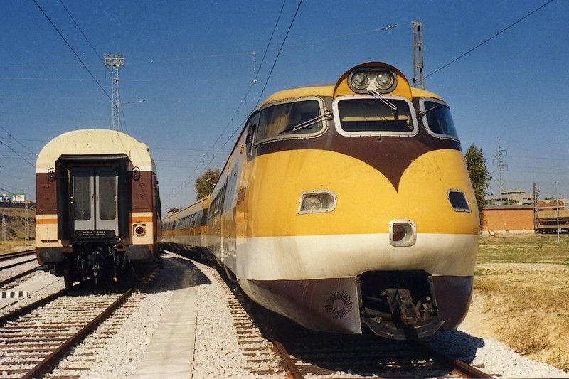 El Electrotrén Basculante 443-001, Platanito, apartado en Madrid-Fuencarral, junto al coche laboratorio de ensayos dinámicos.